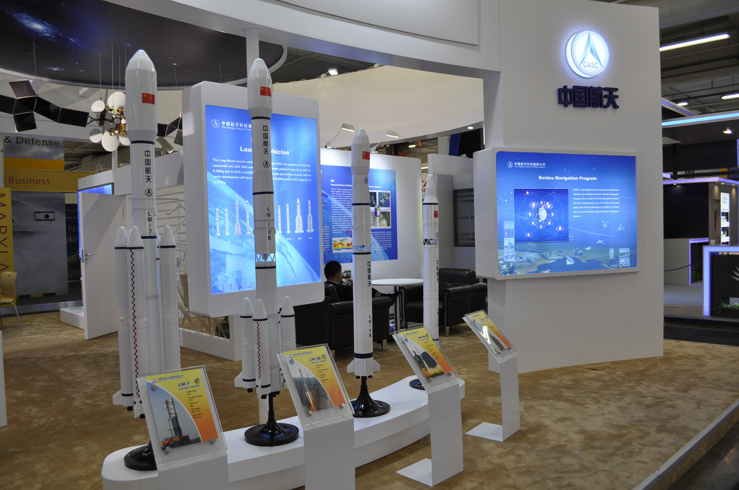 Maquettes des lanceurs spatiaux Long March de l'Académie de Shanghai pour la technologie des vols spatiaux Exposition Société de sciences et technologies aérospatiales de Chine au salon du Bourget 2015